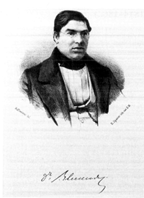 Salomon Abraham Bleekrode (1814-1862)